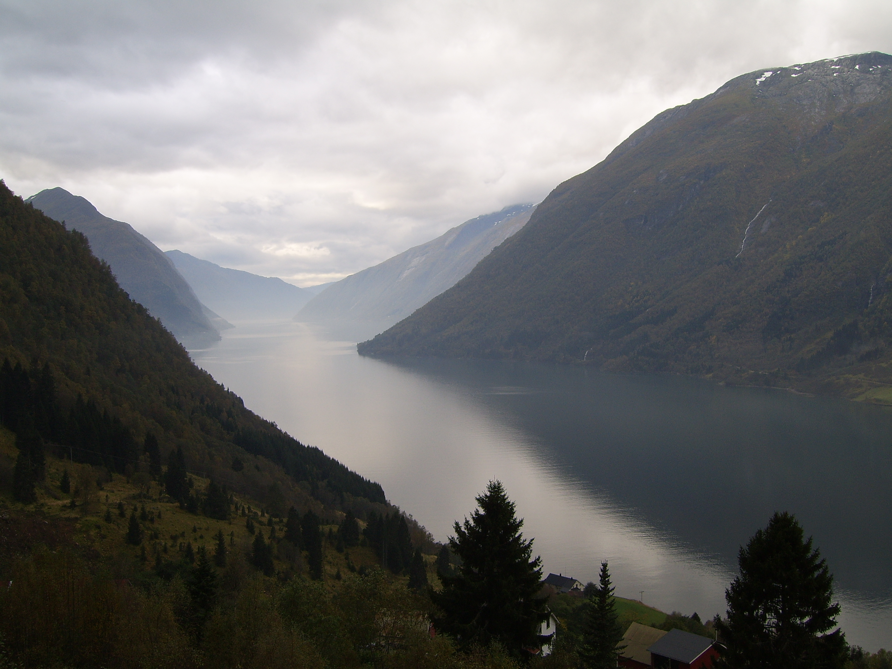 Fjærlandsfjorden